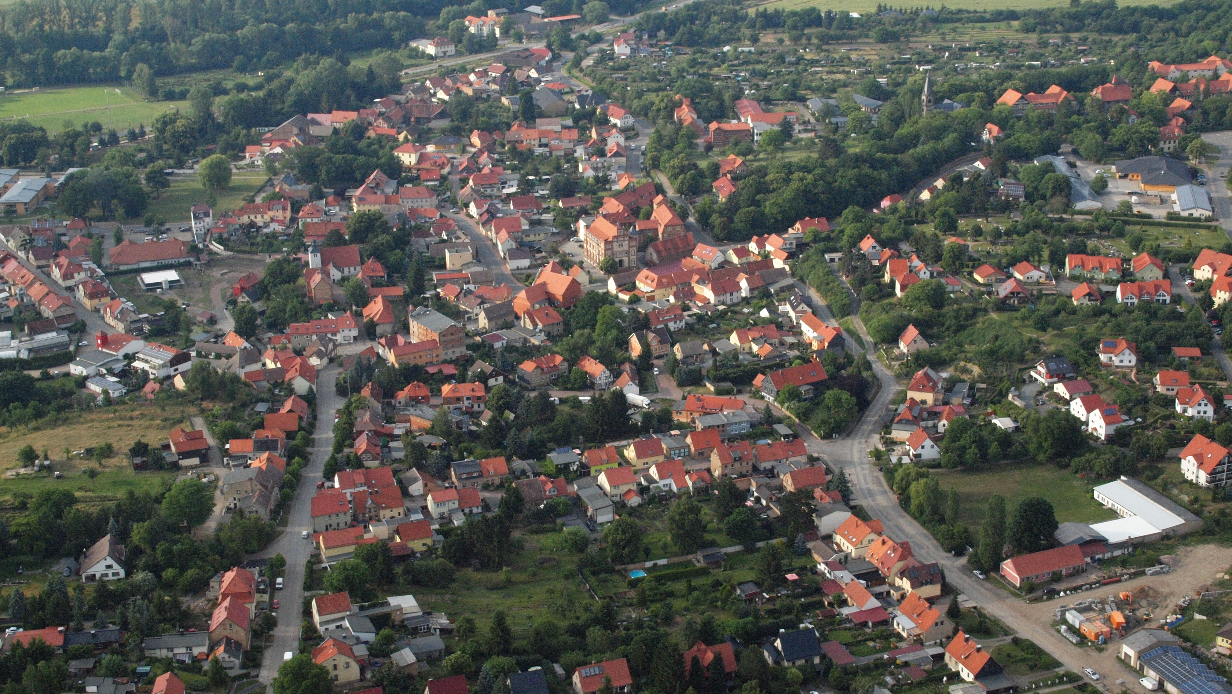 Neinstedt, Luftaufnahme (2015)